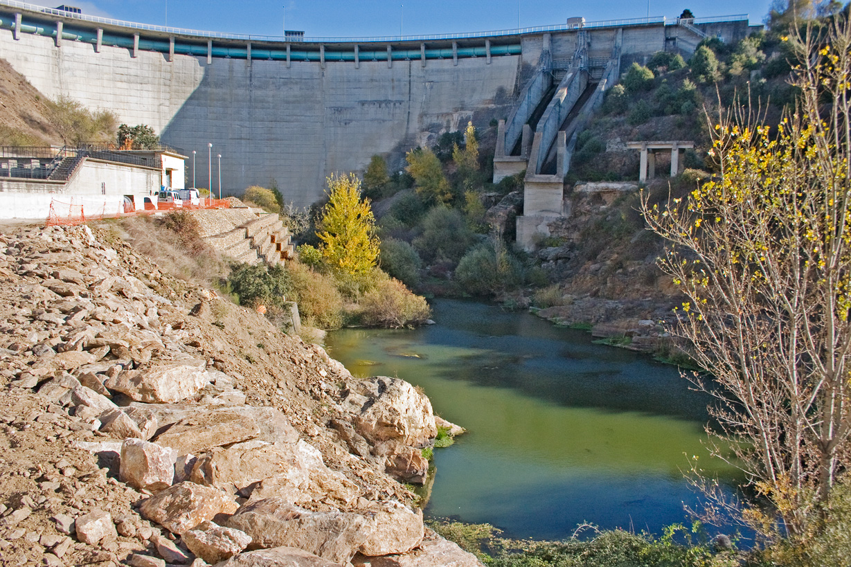 Embalse de El Vellón o de Pedrezuela. Noviembre 2007